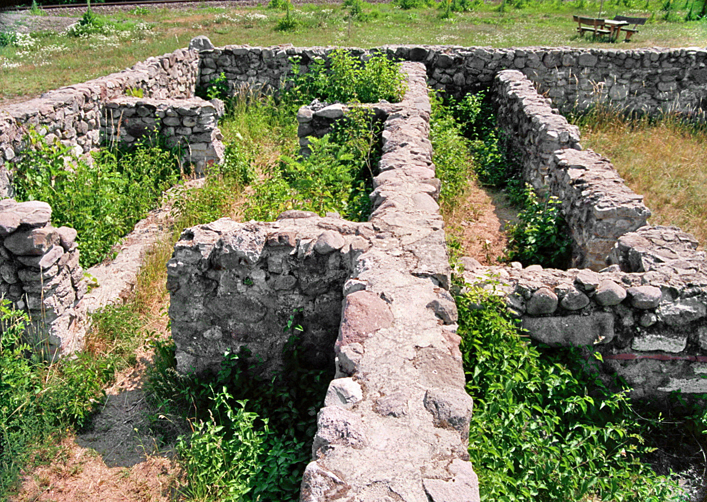 Villa Rustica Szentendre-Skanzen (Ungarn): Blick in die Wohnräume der ältesten Bauphase von Westen.